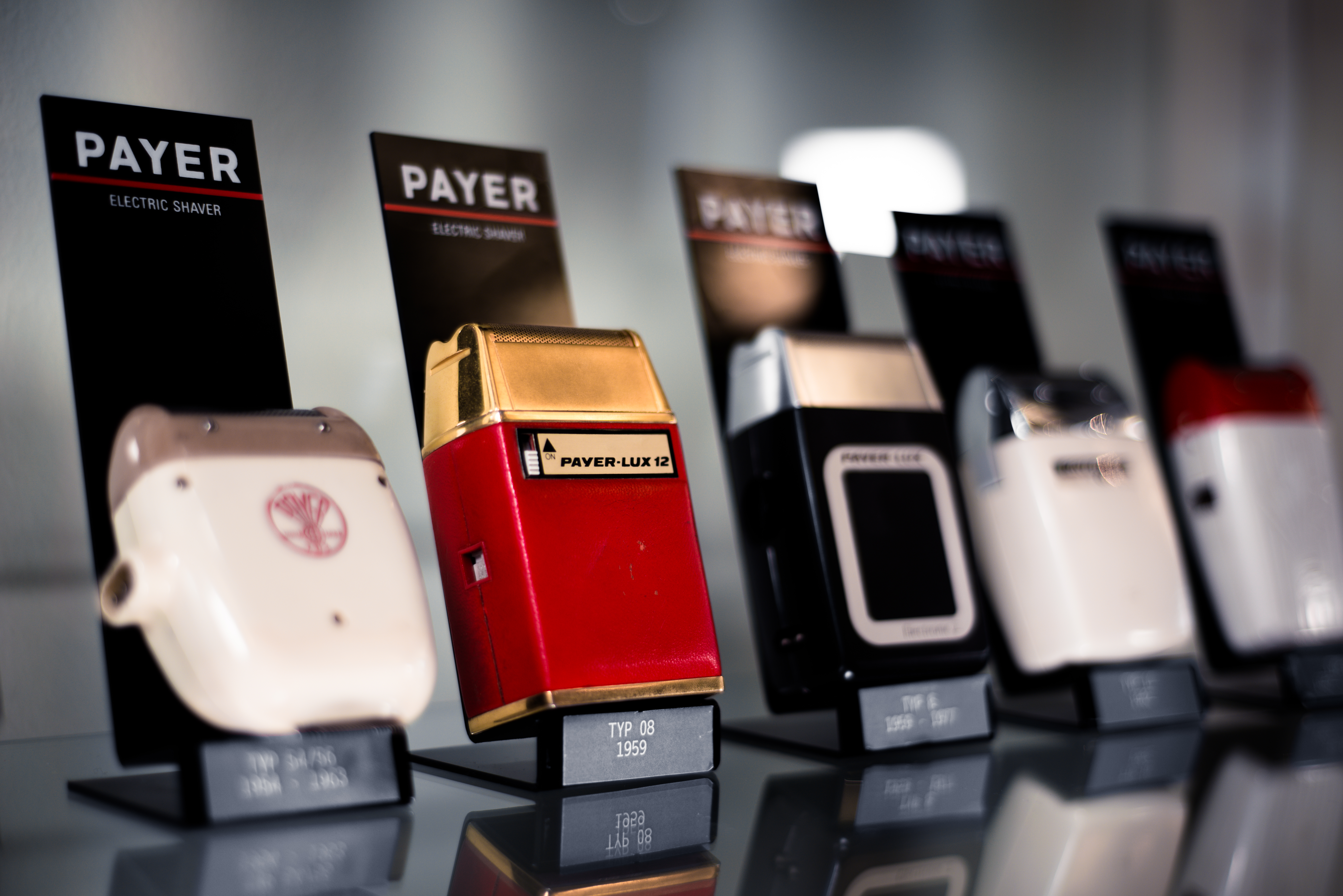 Rassierapparate historisch